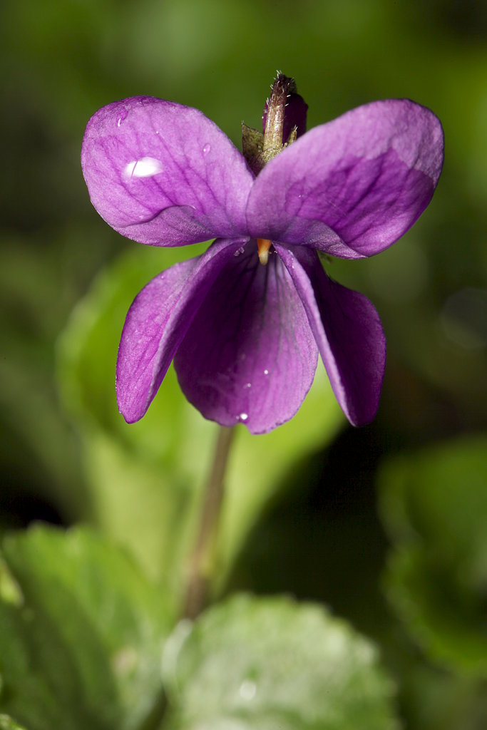 Viola odorata, Morcenx, France